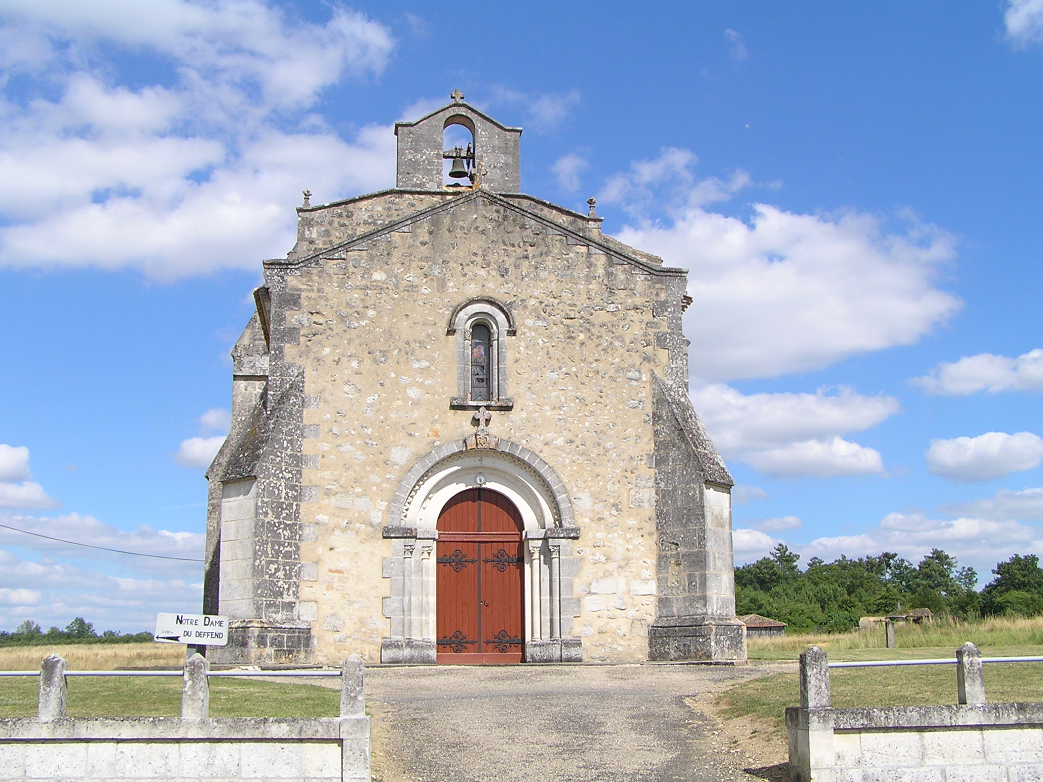 église St-Jean, Le Tâtre, Charente, France